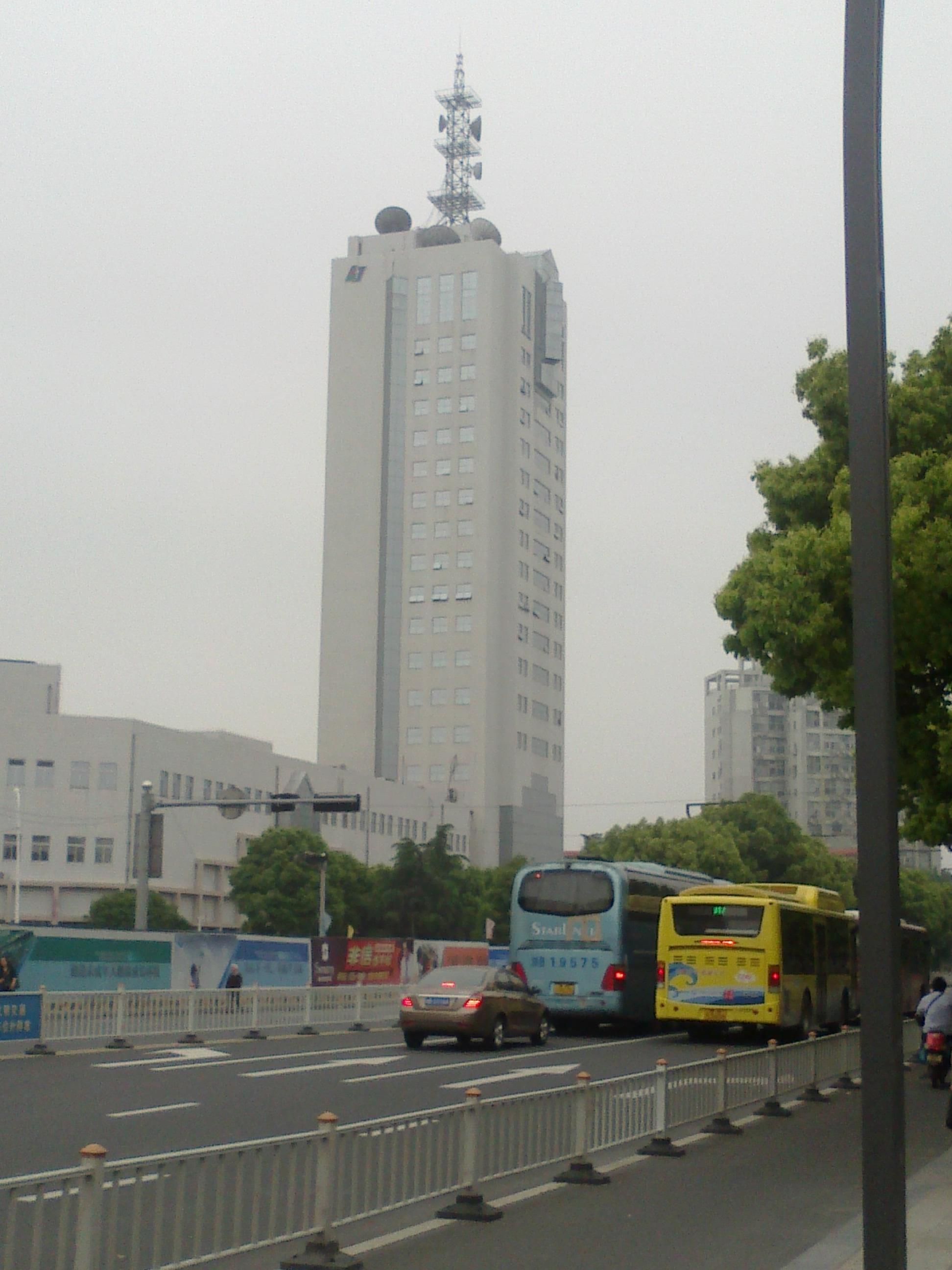 中文（中国大陆）: 宁波电视台